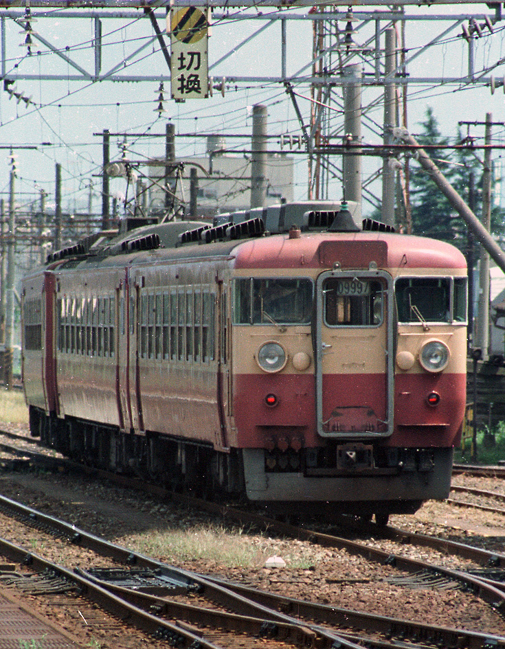 国鉄475系急行形電車 急行立山 立山行